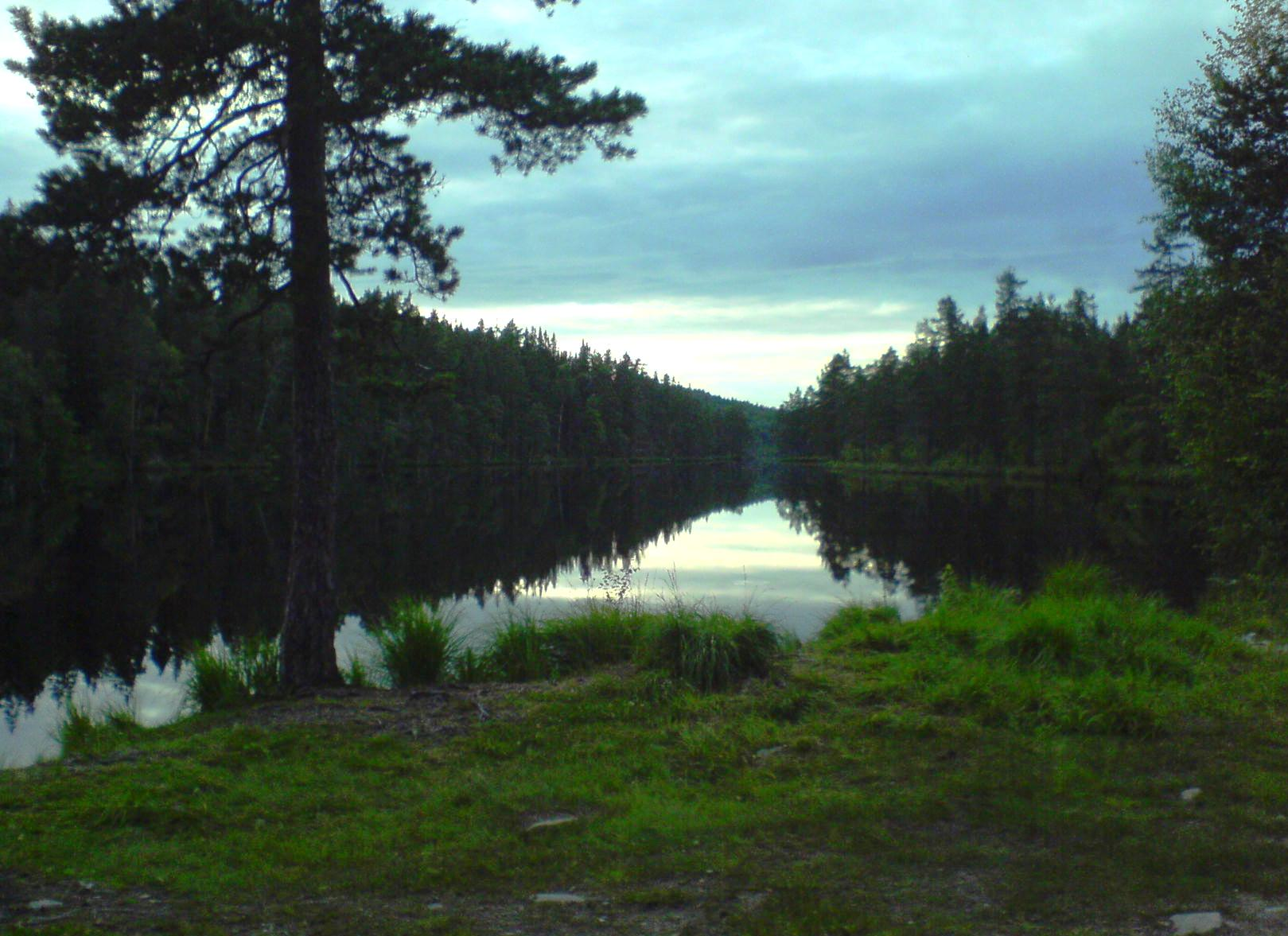 Dyntjern i Aurskog-Høland kommune.